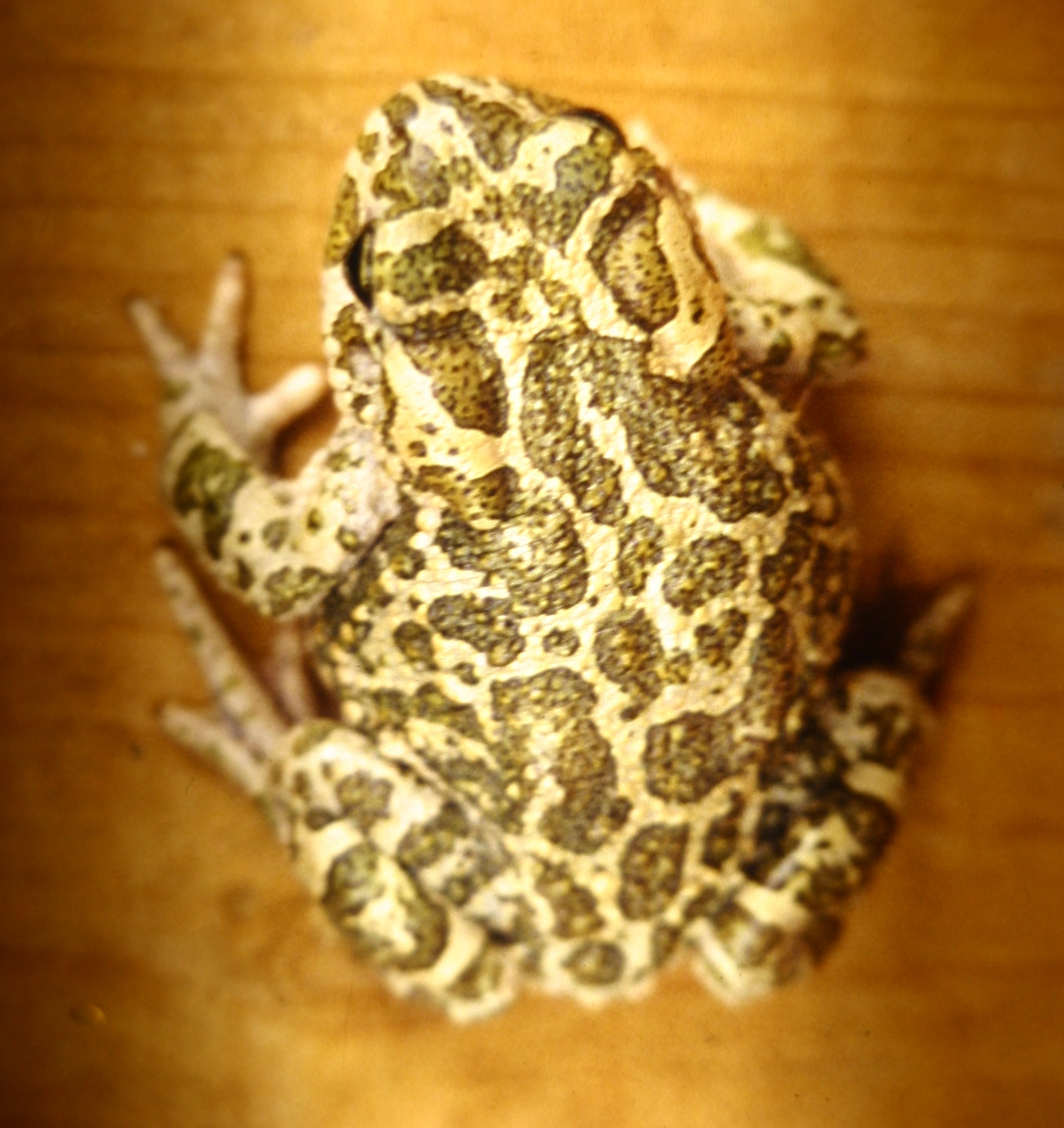 Rospo smeraldino nordafricano - Lampedusa: Vallone Imbriacola